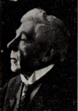 Suomalainen teatterinäyttelijä Axel Ahlberg (1855-1927).